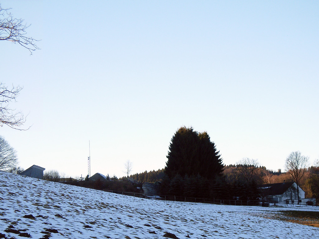 Gummersbach-Veste, Winter 2005/06